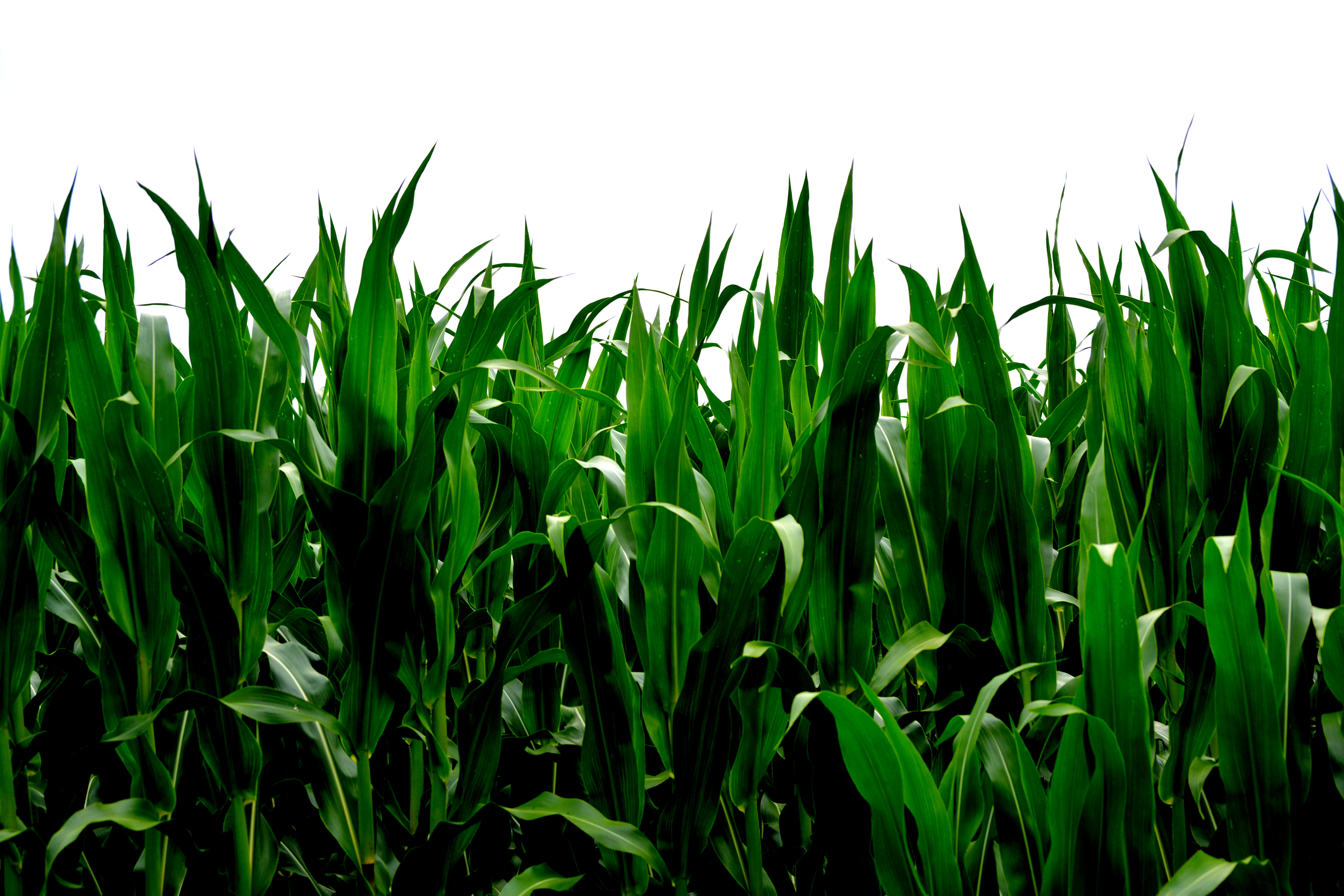 Maize